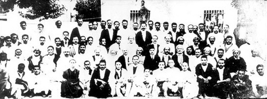 Délégation présidée par Habib Bourguiba et dépêchée auprès du bey pour lui transmettre les protestations et les doléances des Monastiriens après les incidents de la naturalisation